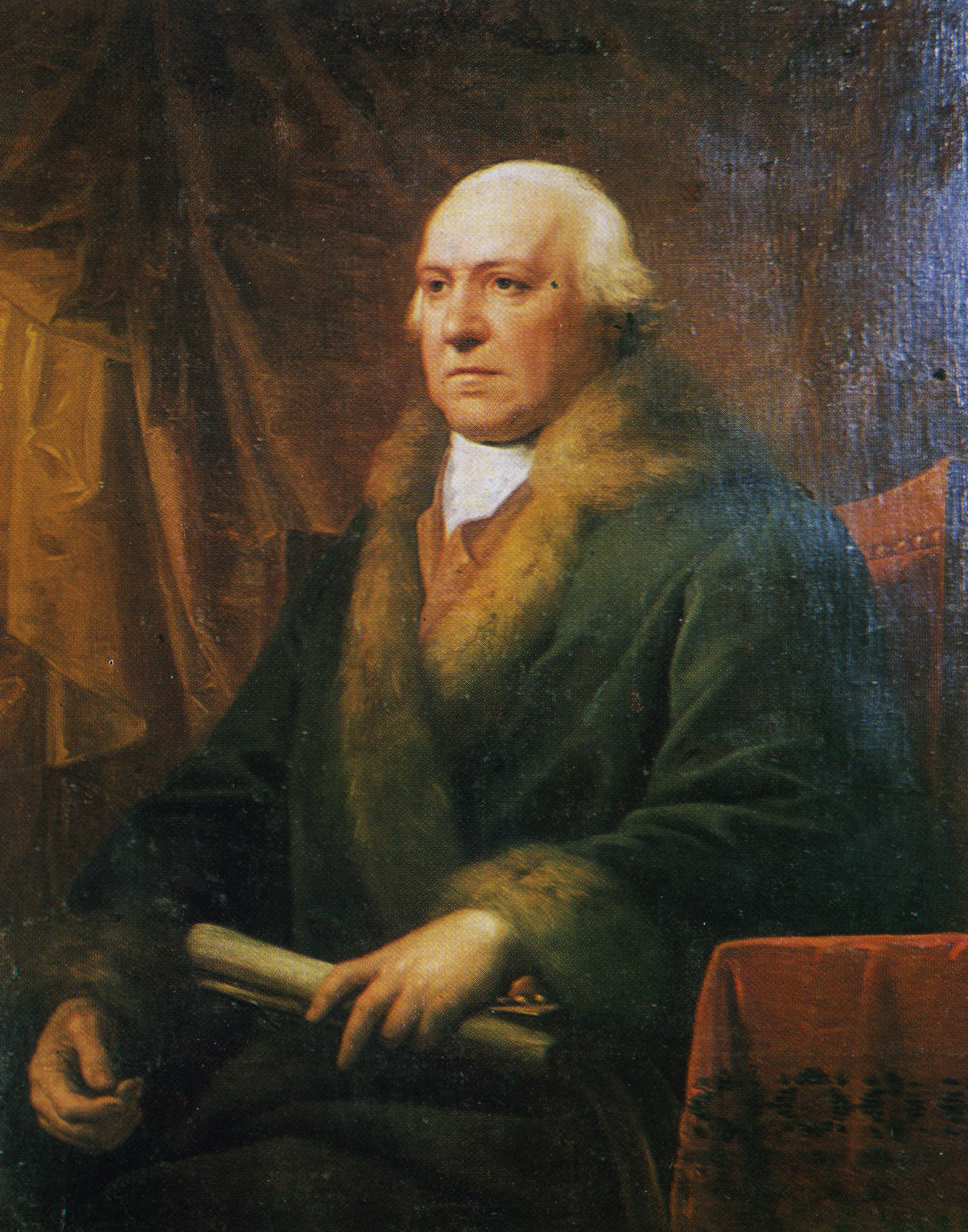 Gemälde